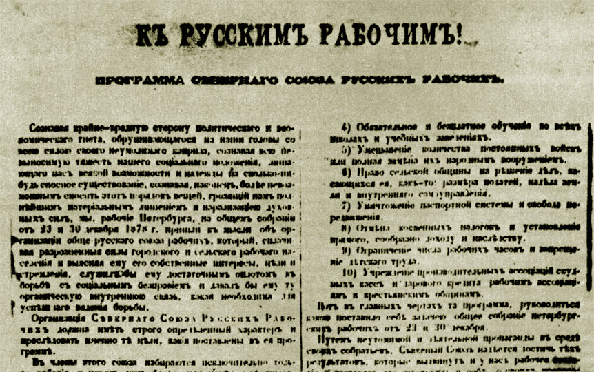 Programma dell'Unione settentrionale operai russi. 12 gennaio 1879